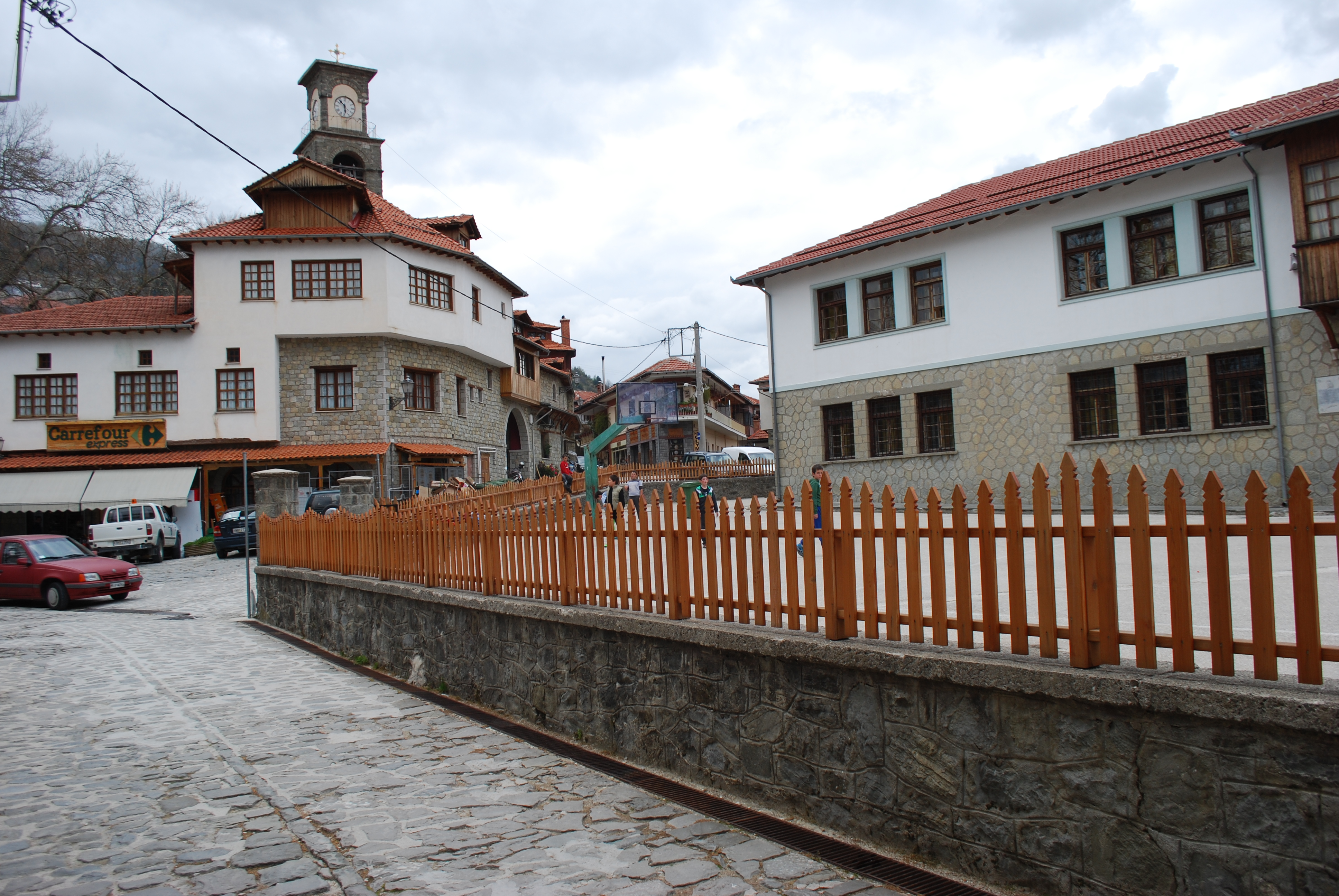 Vue de Metsovo, en Epire.